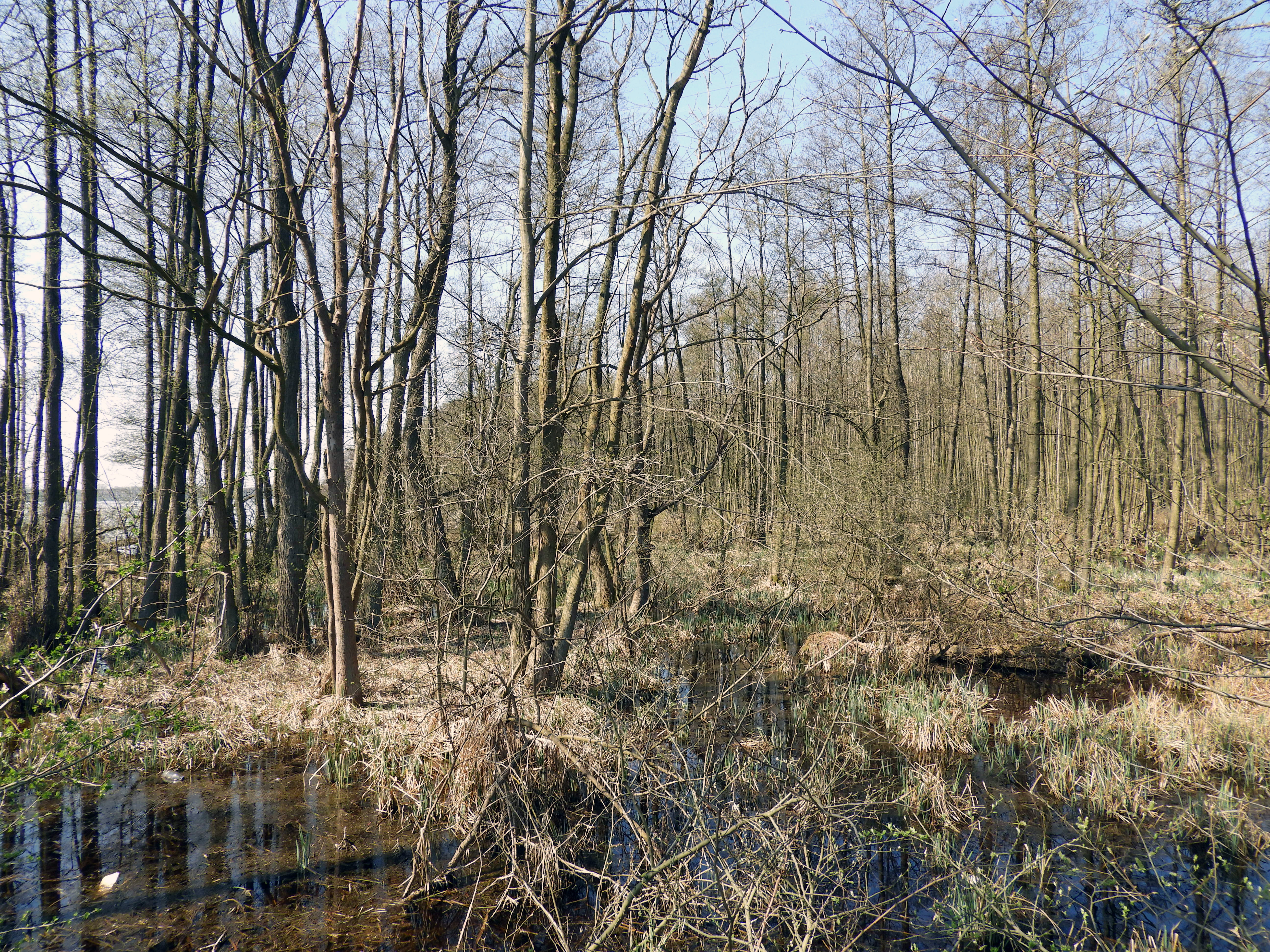 Das in 1979 als Naturschutzgebiet ausgewiesene "Ramper Moor" besitzt eine Fläche von rund 100 Hektar und hat den CDDA-Code 165094. Das Naturschutzgebiet ist ein Teil des Landschaftsschutzgebietes "Schweriner Seenlandschaft im Landkreis Ludwigslust-Parchim". Der in 2005 als Landschaftsschutzgebiet ausgewiesene Bereich mit einer Fläche von 8353 Hektar hat den CDDA-Code 345197. Naturschutzgebiet und Landschaftsschutzgebiet liegen im EU-Vogelschutzgebiet "Schweriner Seen". Das Vogelschutzgebiet hat die Gebietsnummer 2235-402 und erstreckt sich über 19400 Hektar.